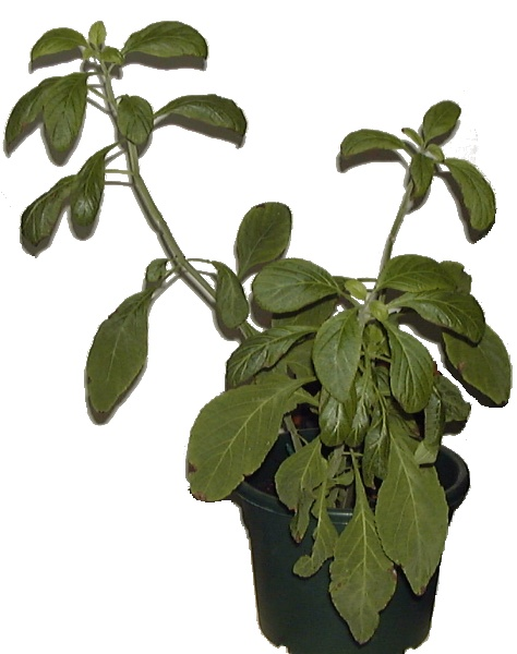 Aztekensalbei - Salvia divinorum